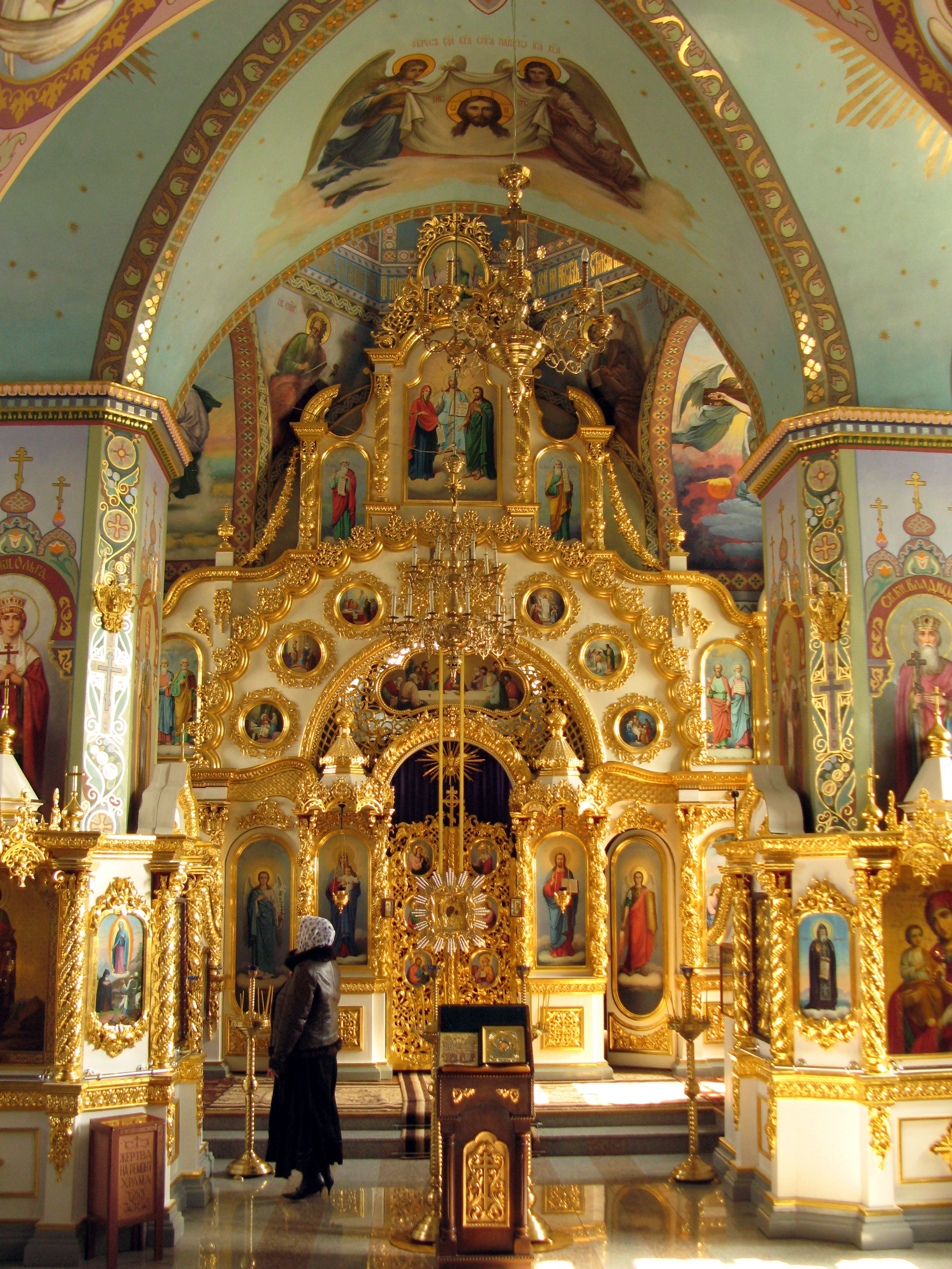 Комплекс Троїцького мо-настиря-фортецi (мур.), с.Дермань